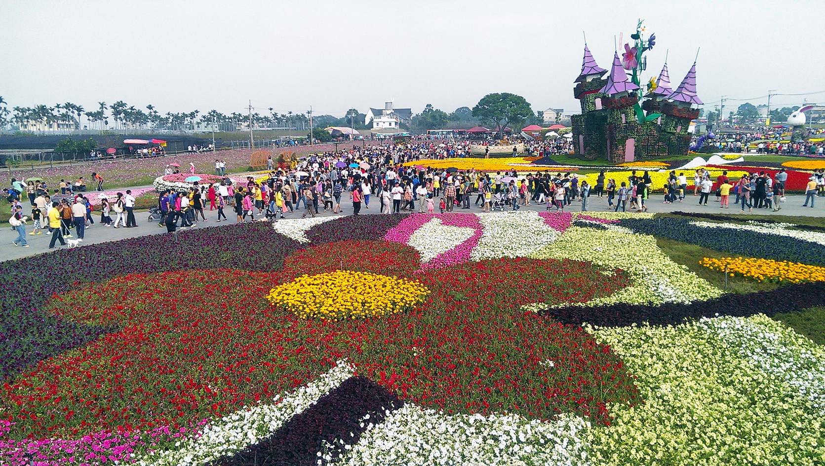 2013年新社花海 花毯